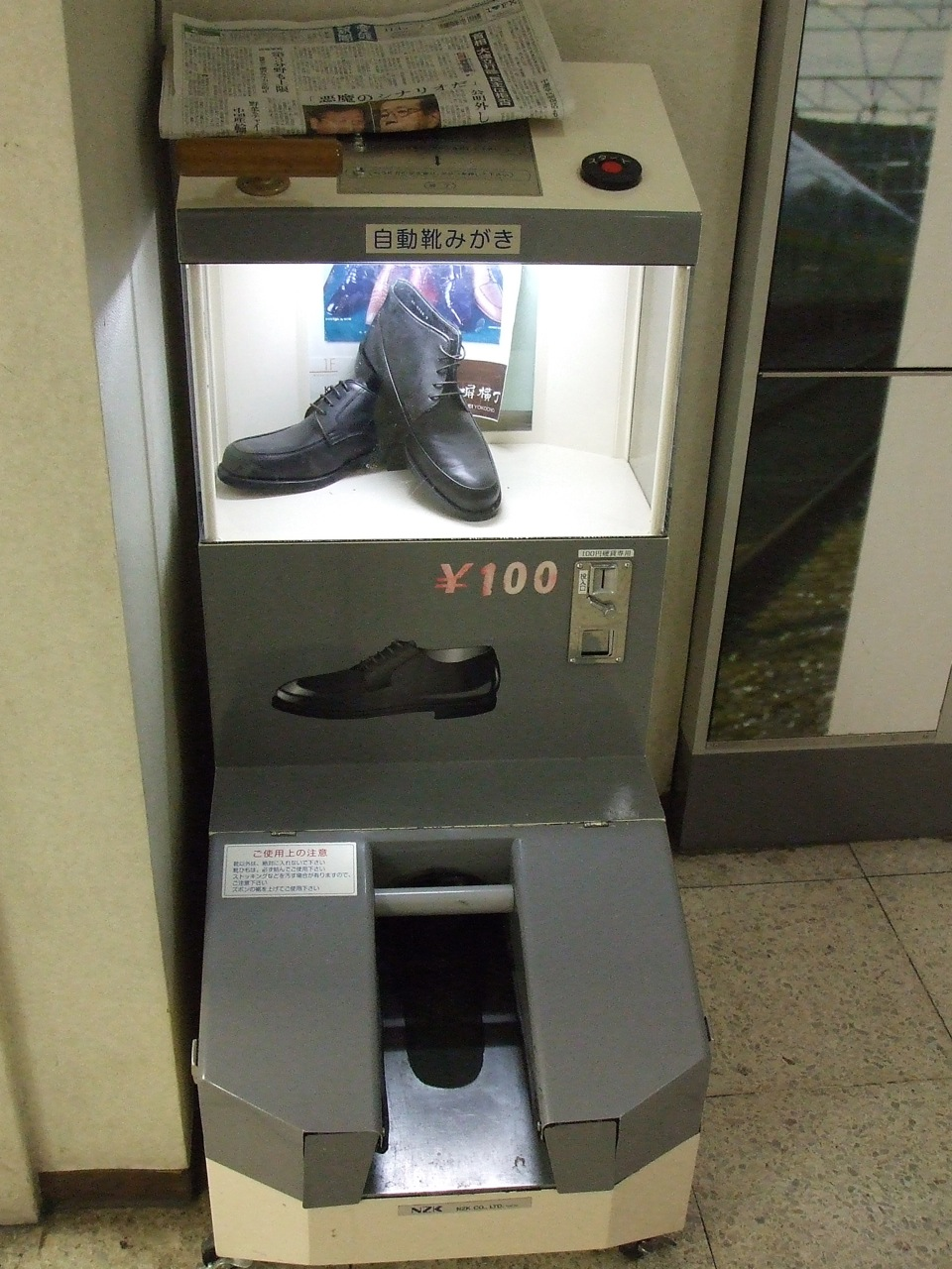 駅の自動靴磨き機ピンチ 東京メトロから撤去へ （朝日新聞社） 2010年11月11日 [1]